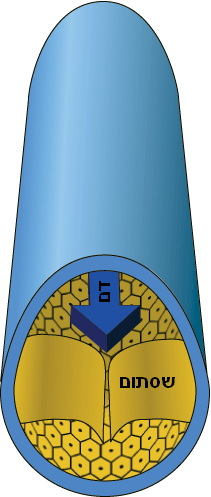 חתך דרך וריד המדגים שסתום חד כיווני